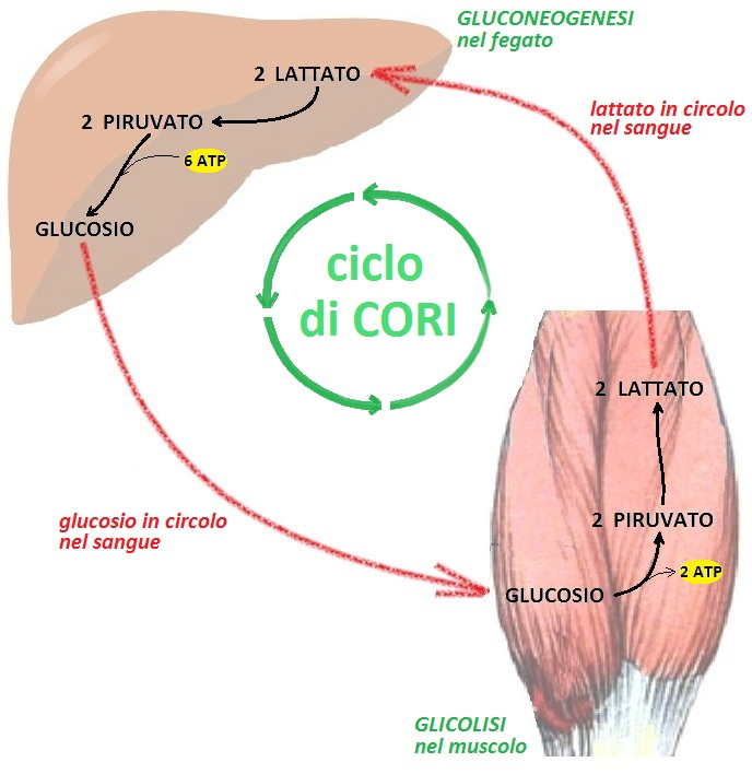 Cori cycle